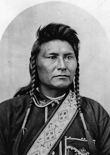 Titre : Nez Perce Chief Joseph poses with decorated sash, Bismark, North Dakota, 1877 Source Studio : United States--South Dakota--Bismark Photographe : Haynes, F. Jay (Frank Jay), 1853-1921 Reproduction par : Goff, O. S. (Orlando Scott), 1843-1917 Date de publication : 1877 Notes : Head shot of Joseph, wearing shirt with decorated collar & pocket, and a decorated sash across chest. Copy print by O. S. Goff. Same man in L88-330, L91-149.8, L91-149.9, L93-72.40, L93-72.40B, L94-7.119, L94-7.217, NA605, NA606, NA607, NA608, NA609, NA610, NA623, NA624, NA879, NA1285, NA1287 Référence collection : 564: Aa-42a, General Indian Collection no. 564, Repository University of Washington Libraries. Special Collections Division